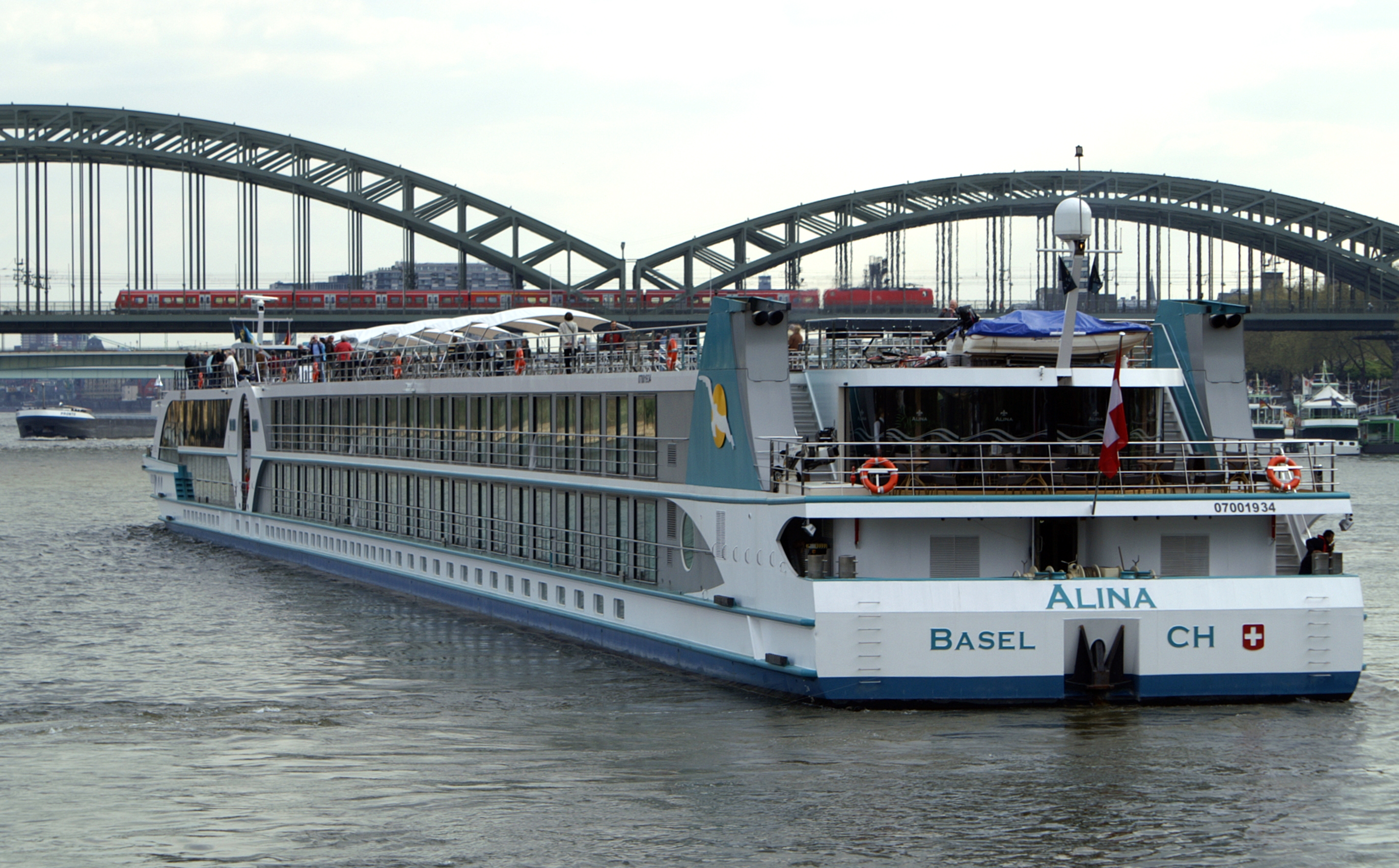 Flusskreuzfahrtschiff Alina von Scylla Tours beim Wenden in Köln.